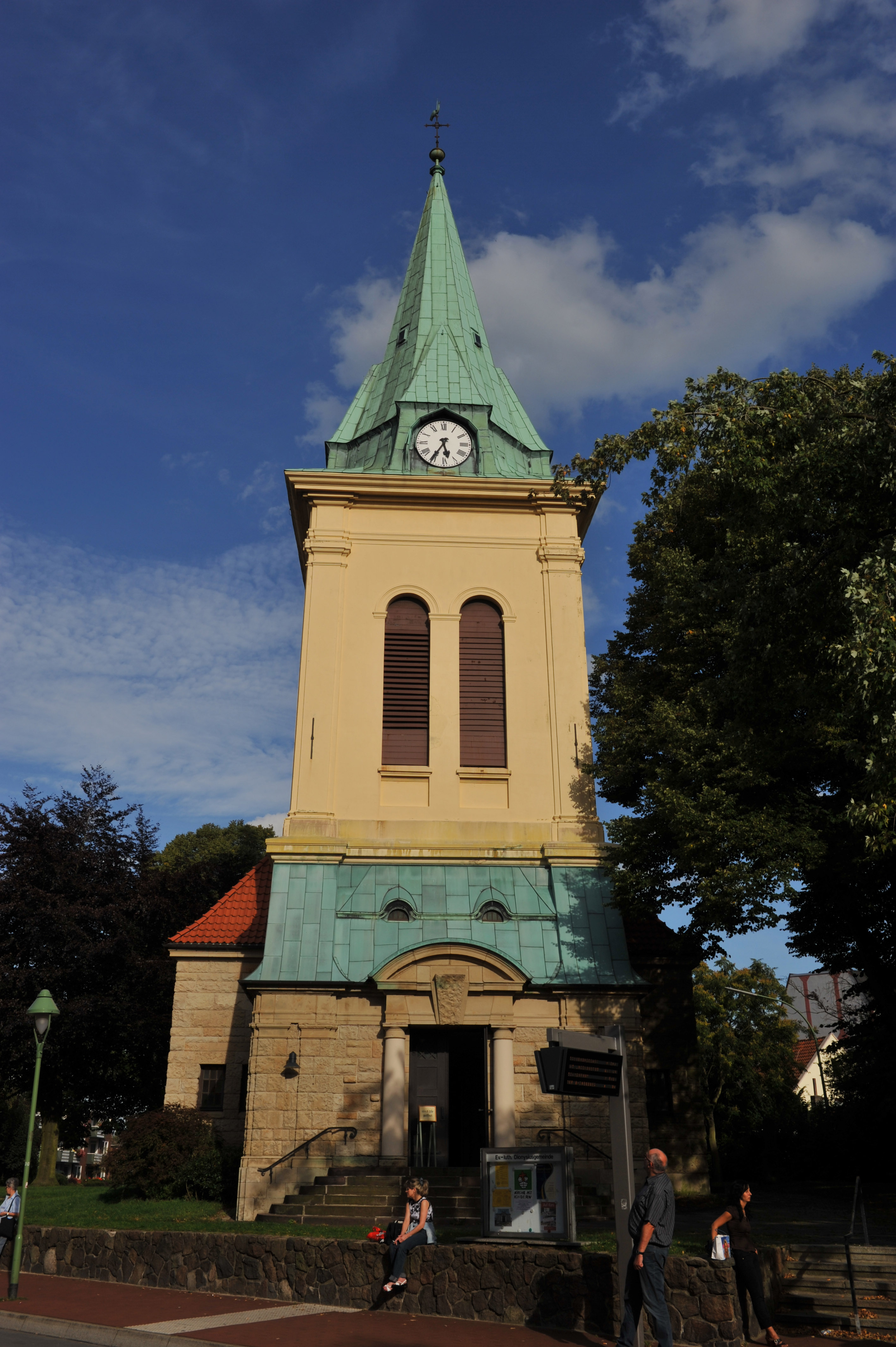 Historical building in Bremerhaven, northern Germany Evangelisch-lutherische Dionysiuskirche, Lange Straße 83, 1802-1803, Umbau 1909 (1978)